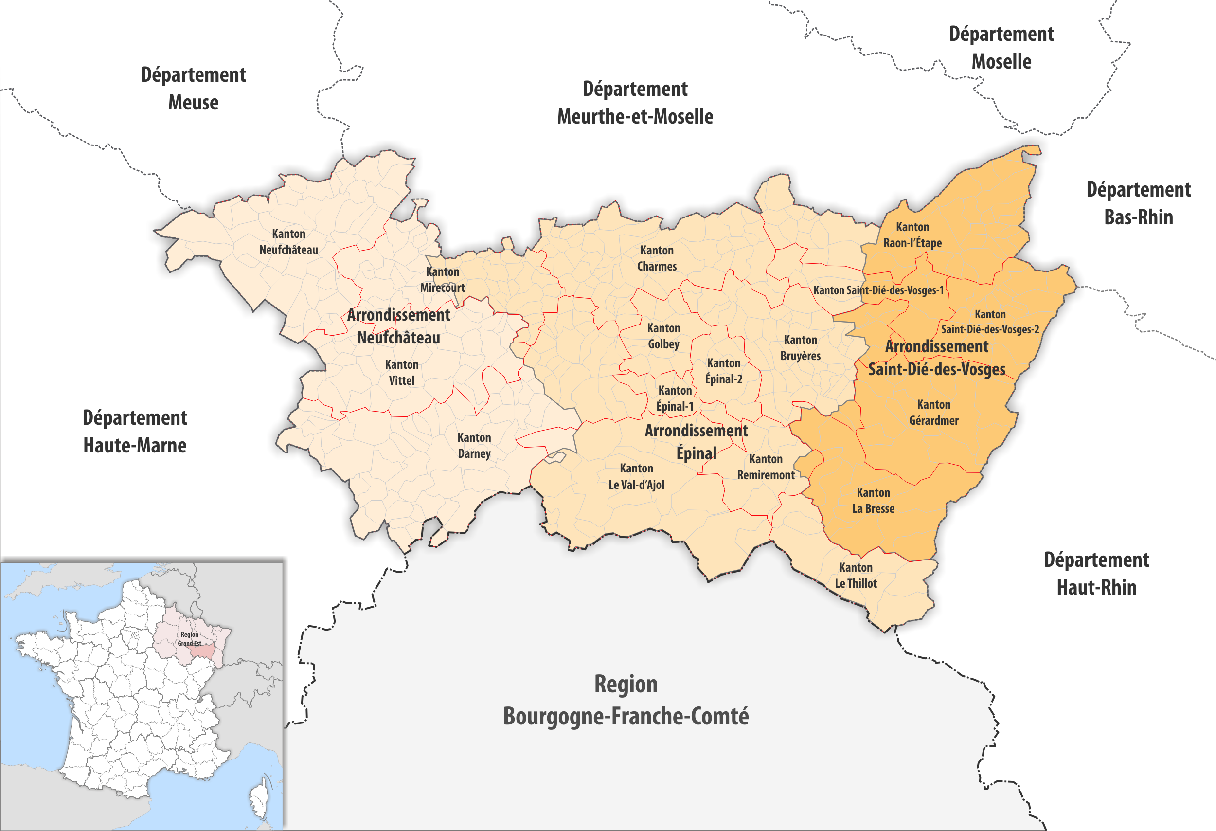 Gemeinden, Kantone und Arrondissemente im Departement Vosges